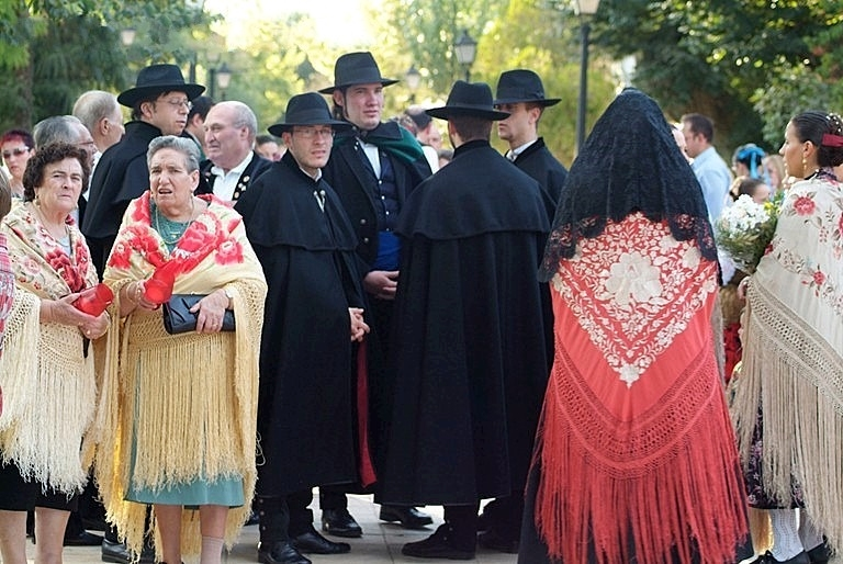 Atuendos típicos de Madridejos en la ofrenda floral al Cristo del Prado